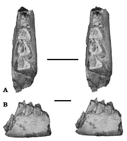 Palaeohypsodontus zinensis sp. nov., late Oligocene (Chattian), Lundo J2, Bugti Hills, Balochistan, Pakistan. Holotype (ISEM DBJ2−A1). A. Stereophoto of occlusal view. B. Stereophoto of labial view. Scale bars 1 cm.